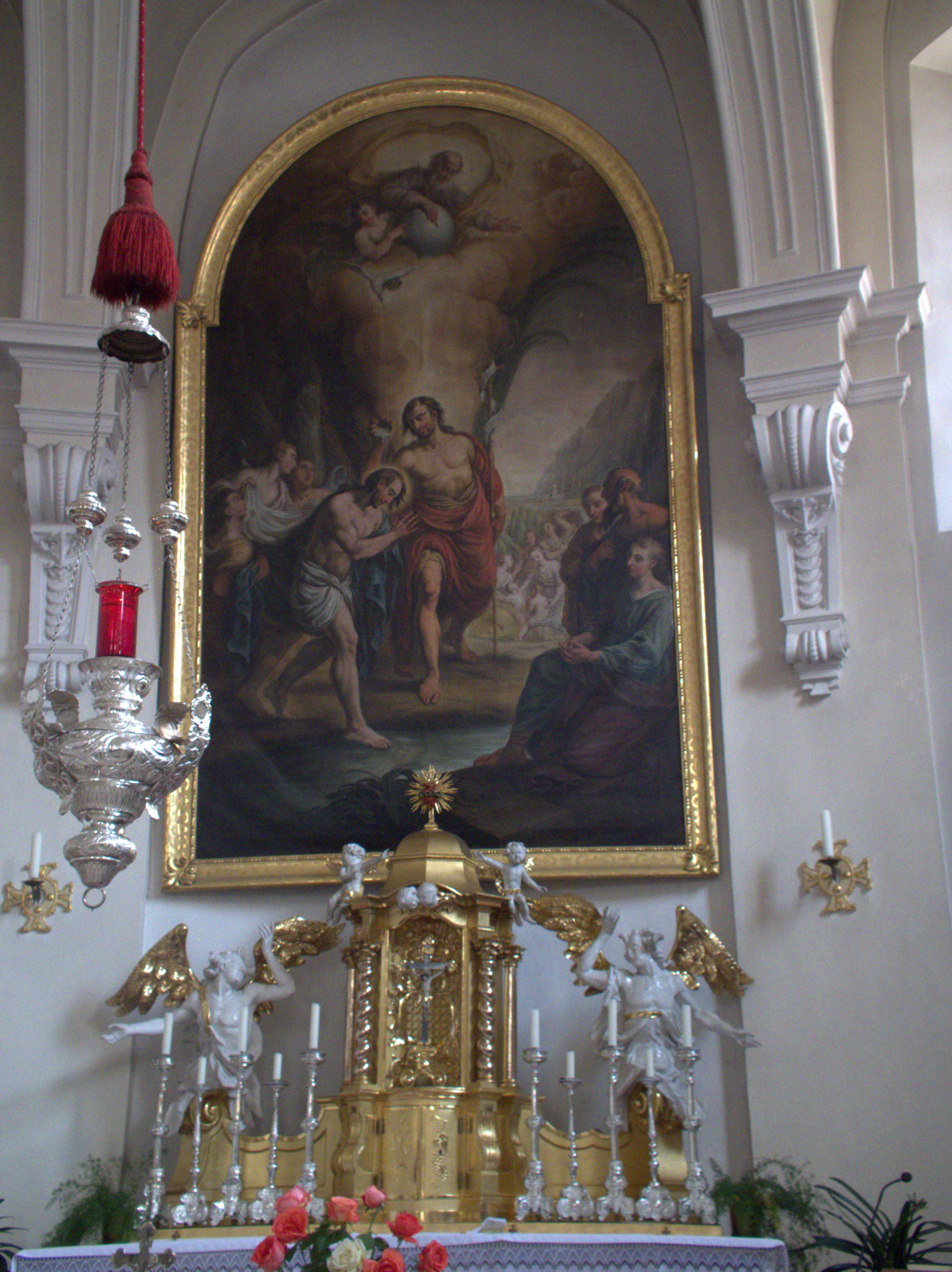 Stiftskirche St Johann in Regensburg am Krauterermarkt 5: Hauptaltar